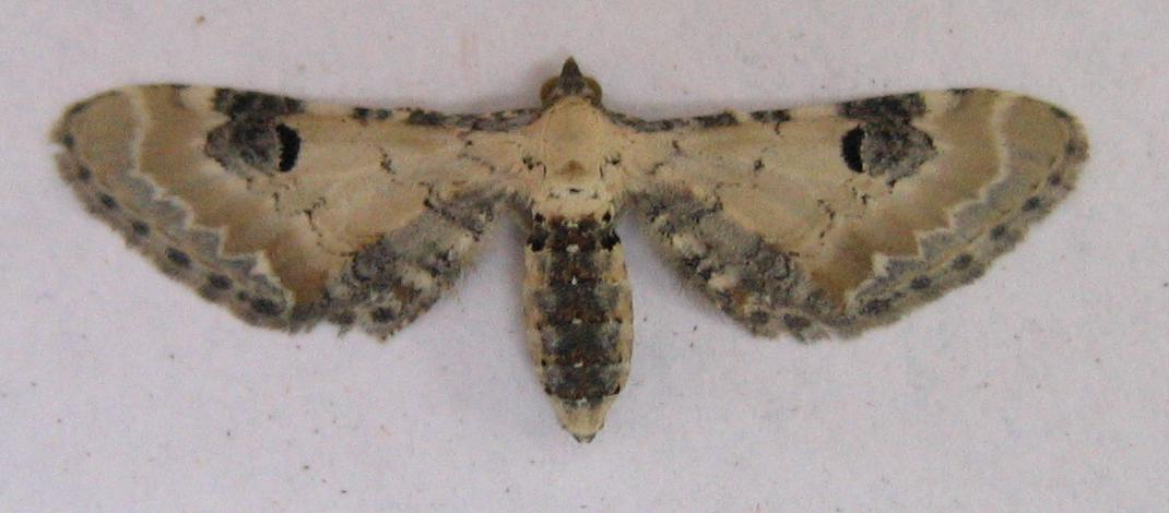 Eupithecia centaureata (Denis & Schiffermüller, 1775), Geometridae, Lepidoptera, Groß Machnow, Brandenburg